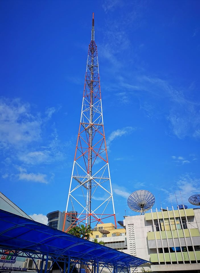 Thap truyen hinh HTV moi